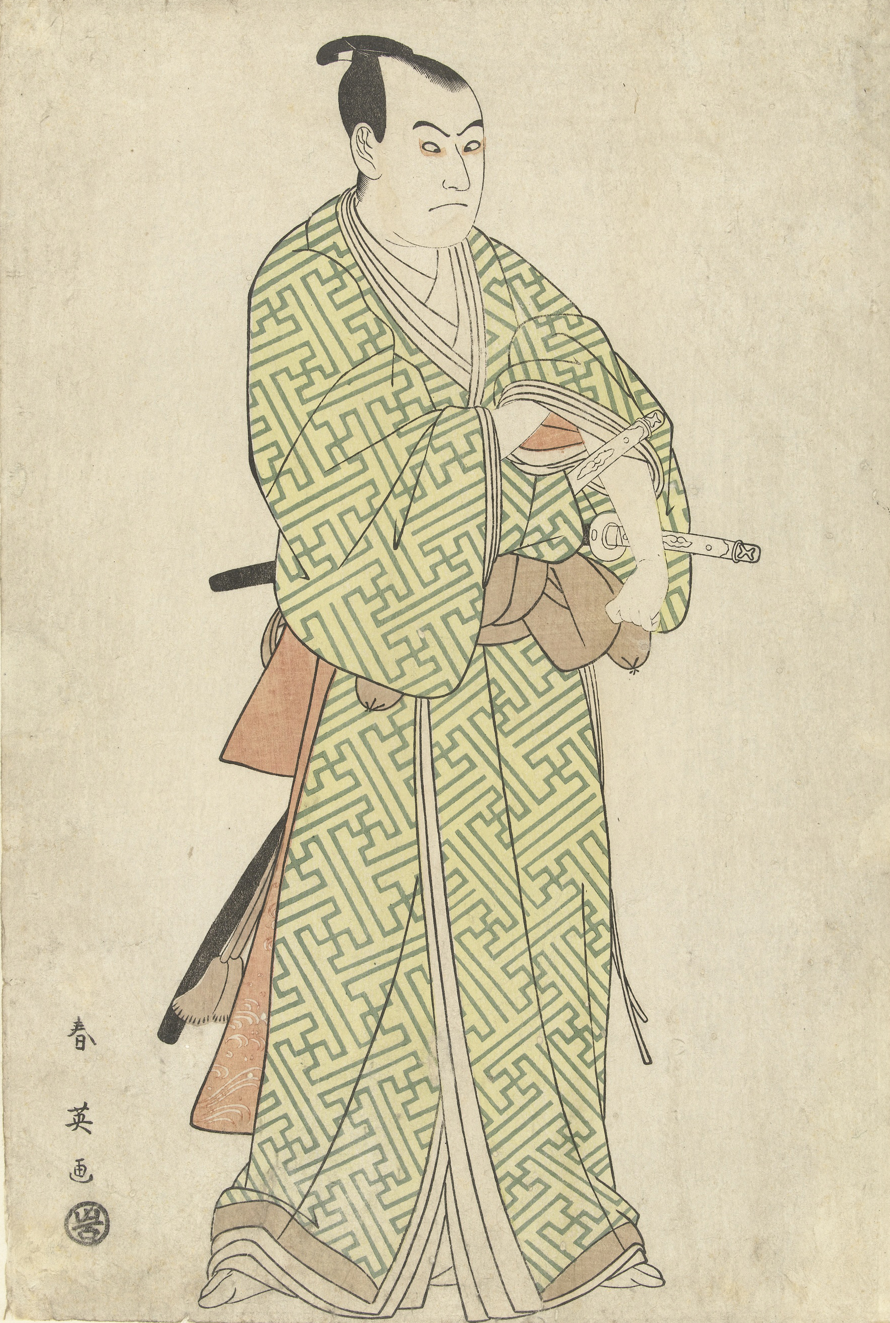 De acteur Sawamura Sojuro III, ten voeten uit, in groene kimono met geometrisch patroon, de linker mouw opstropend. Scène uit het toneelstuk Kanadehon Chushingura, opgevoerd in het Miyakoza theater in de vierde maand van 1795. Label Line: mentioned on object Katsukawa Shunei (1762 - 1819), 1795, kleurenhoutsnede; lijnblok in zwart met kleurblokken Collection: prenten; Japan (collectie)